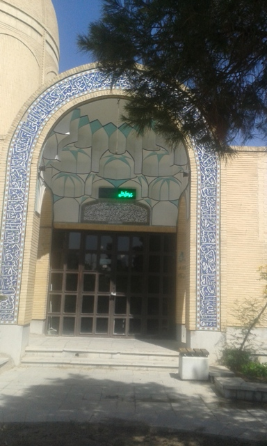 گنبد و بارگاه مرقد بانو مجتهده امین